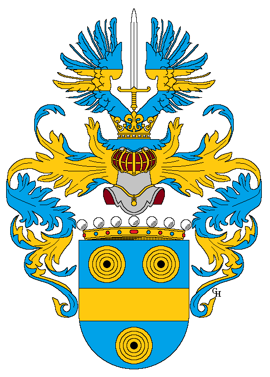 Wappen des k.u.k. Feldzeugmeisters und Reichskriegsministers Ferdinand von Bauer (1825–1893), verliehen anlässlich seiner Erhebung in den österreichischen Freiherrenstand 1881. Zeichnung von Gerd Hruška ( Für weitere Informationen zu dieser Standeserhebung siehe (